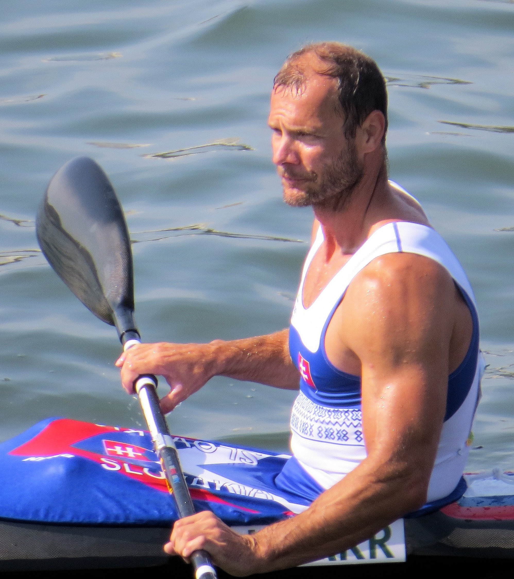 Sx50